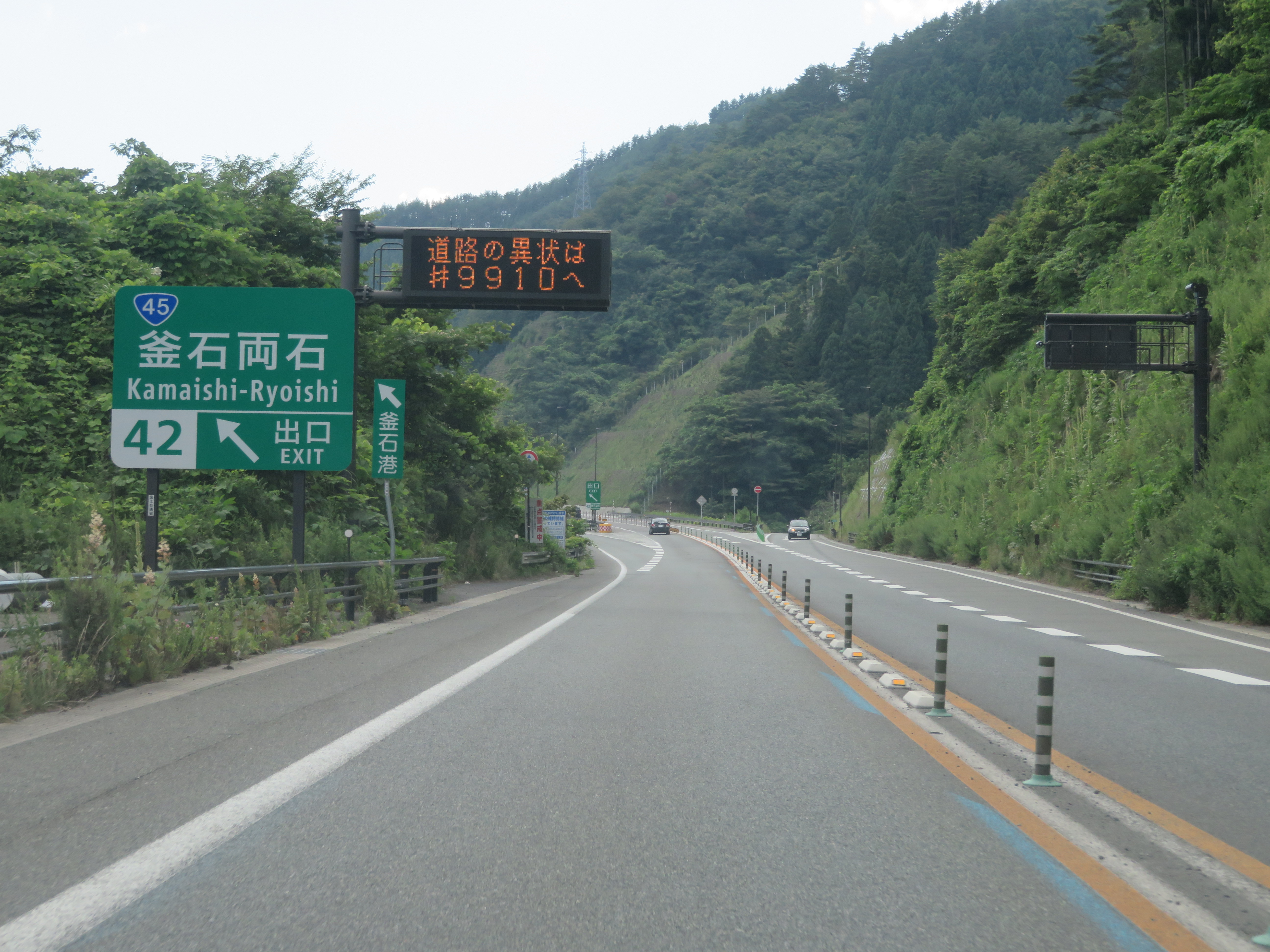 三陸自動車道釜石両石インターチェンジ出口付近（宮古方面側から撮影）